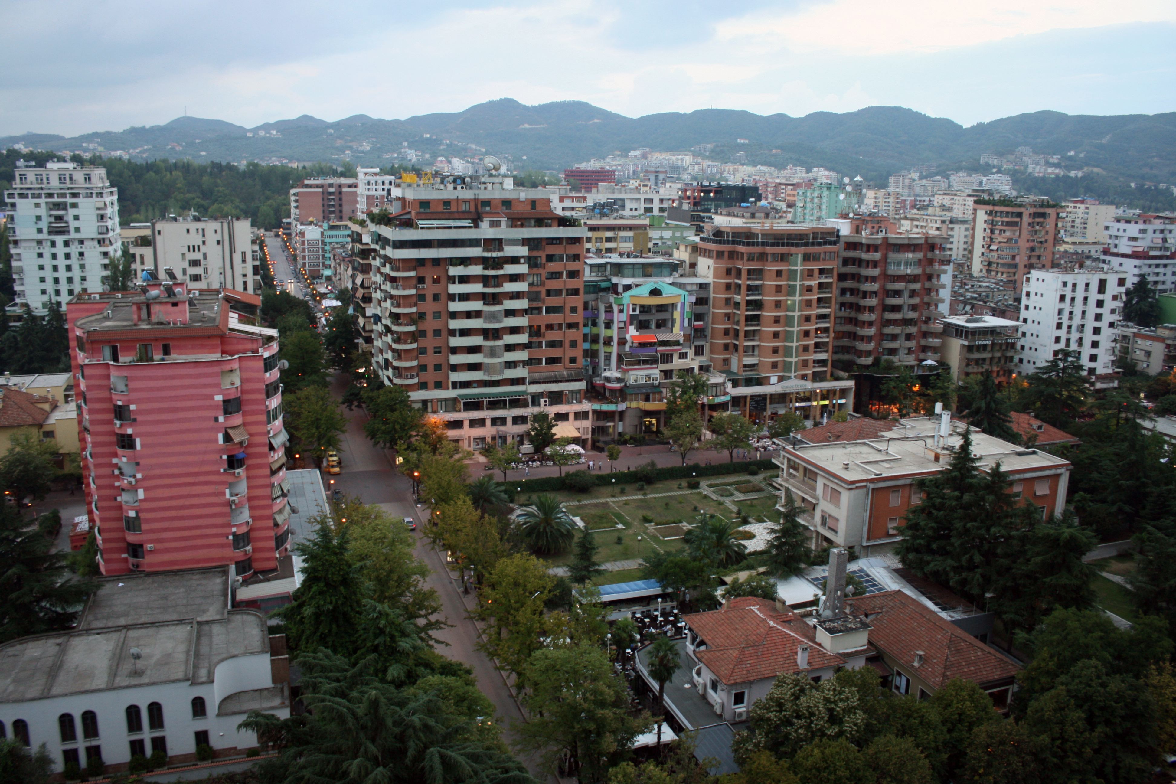 Dusk mutes colors